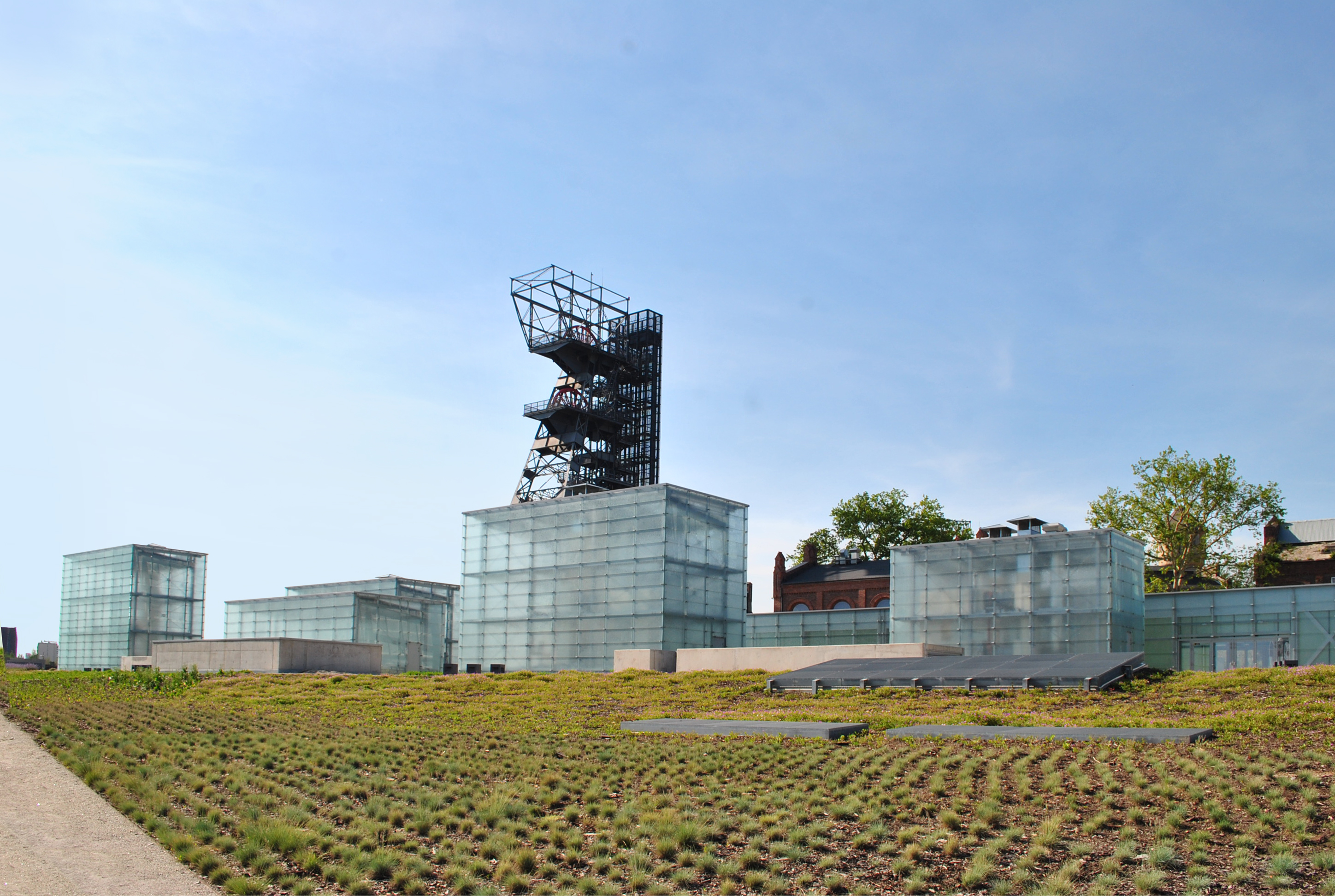 Katowice. Nowa siedziba Muzeum Śląskiego (przed otwarciem)